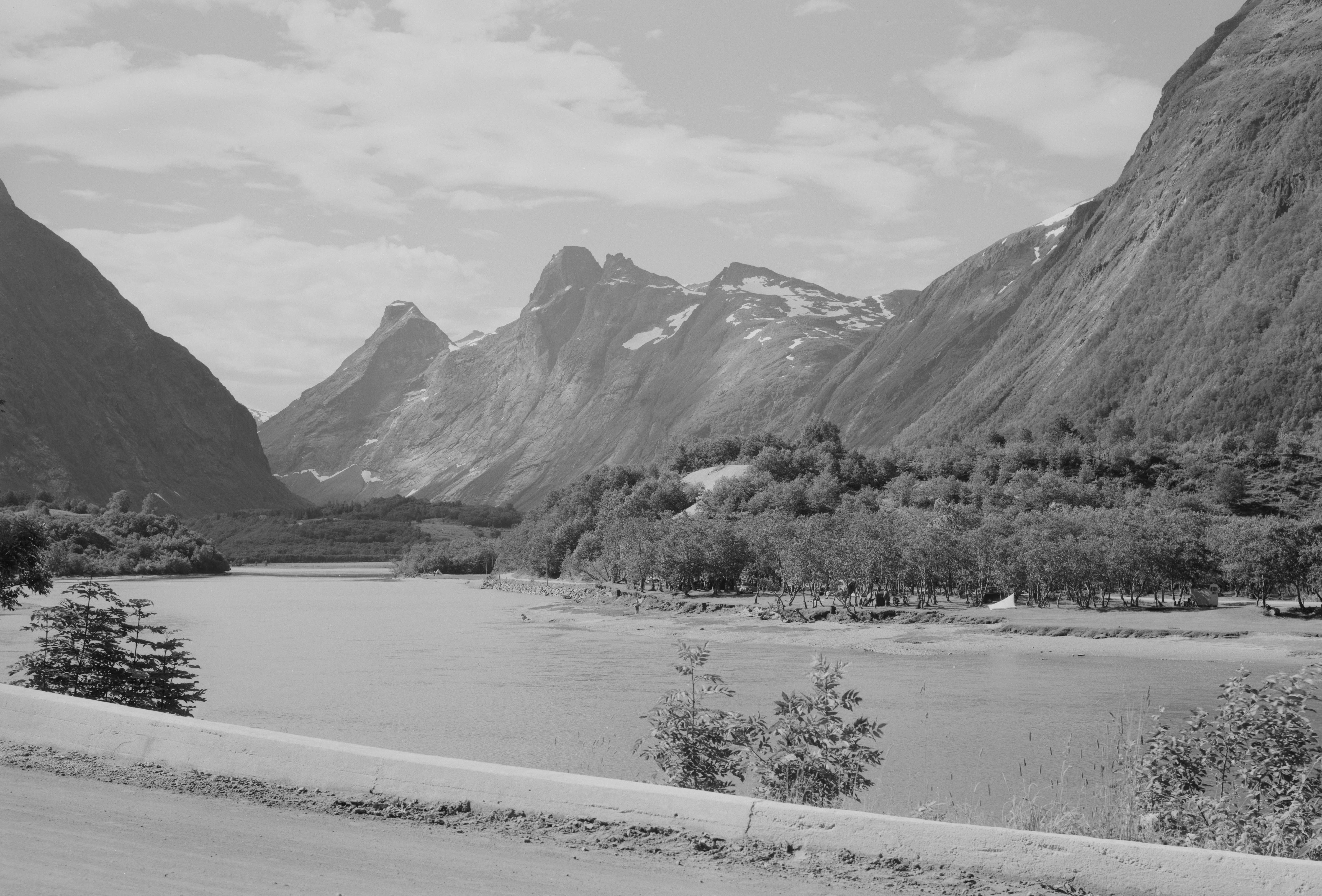 Bildet er hentet fra Nasjonalbibliotekets bildesamling Bispen,Dronninga,Isterdalen,Kongen, Rauma, Møre og Romsdal